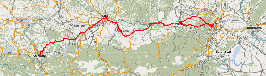 Streckenverlauf der Österreichischen Westbahn